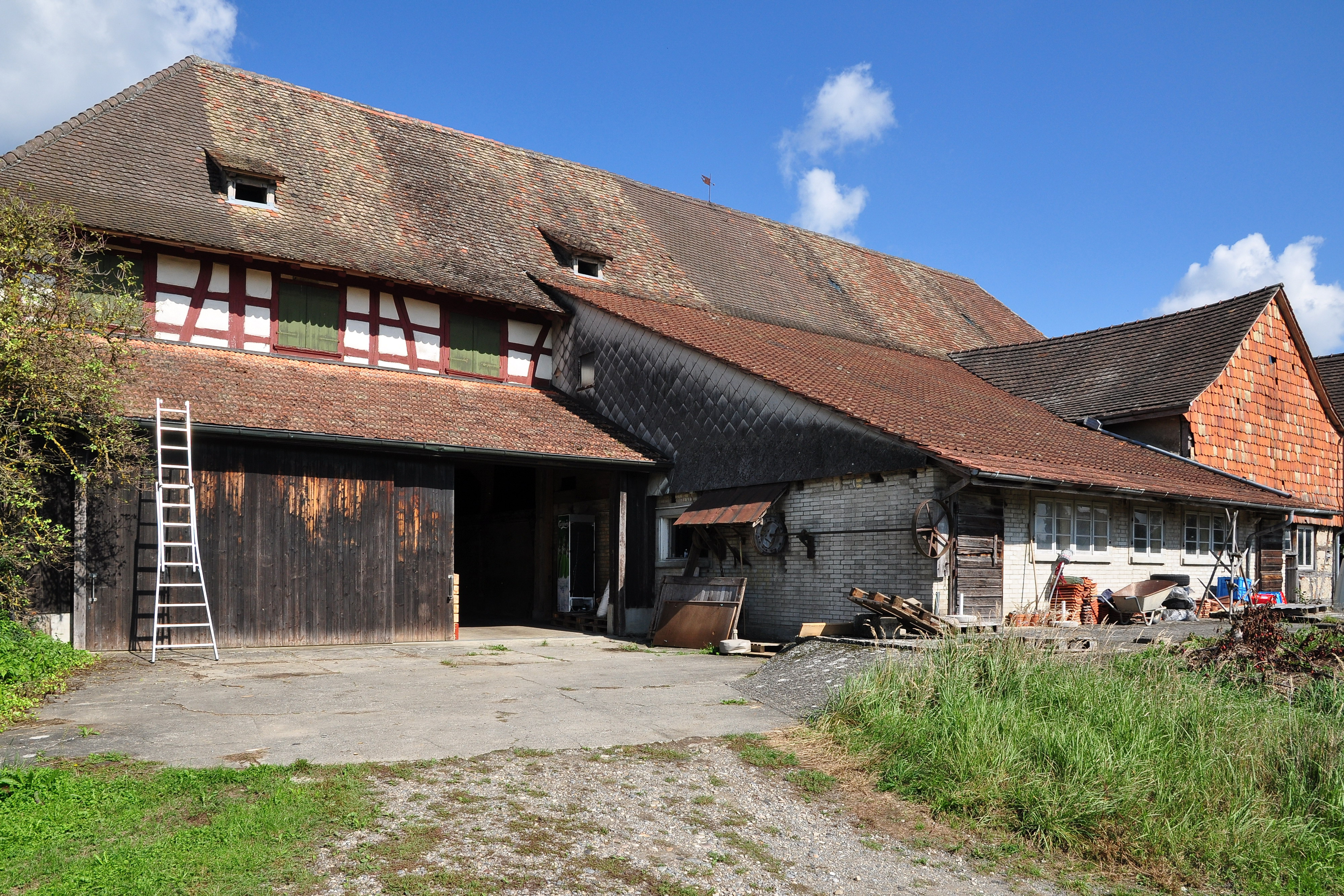 Herrschaftshaus und Doppelscheune, Rudolfingen, Dorfstrasse in Trüllikon (Switzerland)